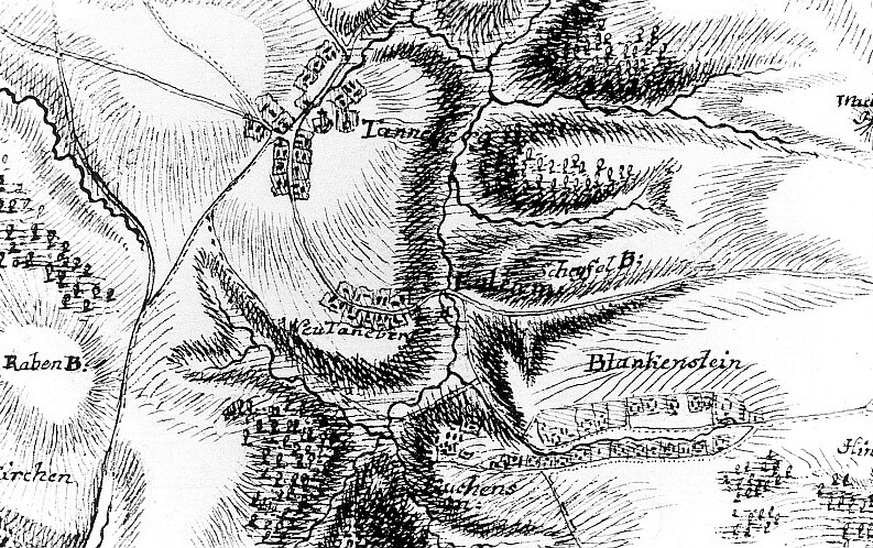 Original image description from the Deutsche Fotothek Triebischtal-Tanneberg. Ausschnitt aus: Karte von einem Teil des Kurfürstentums Sachsen, Petri, nach 1759 (Sign.: VII 63)